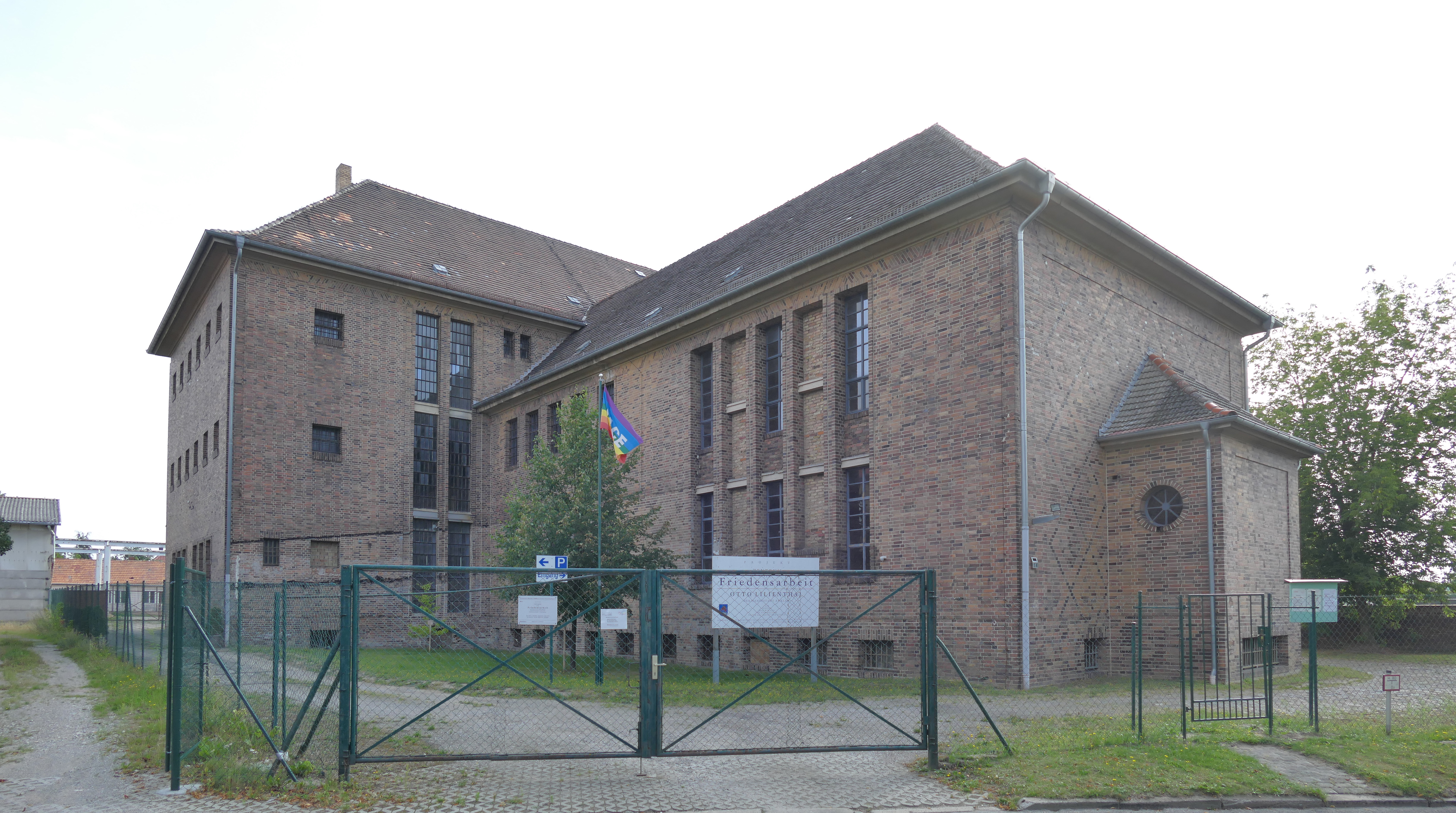 Anklam, ehemaliges Wehrmachtsgefängnis, Ansicht von Südwesten, Eingangsbereich